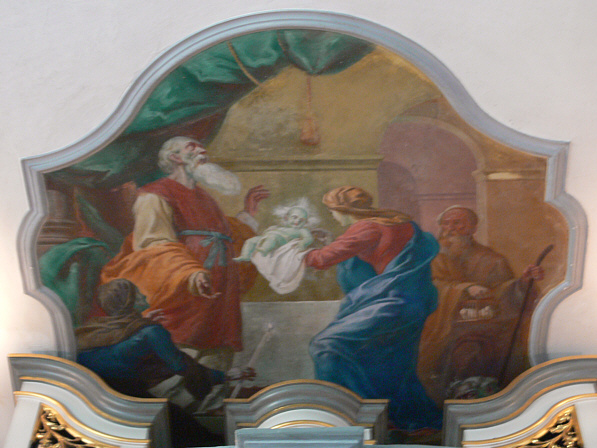 Frauenbergkirche, Bad Waldsee Deckengemälde im Langhaus, Eustachius Gabriel: Darbringung im Tempel, 1762